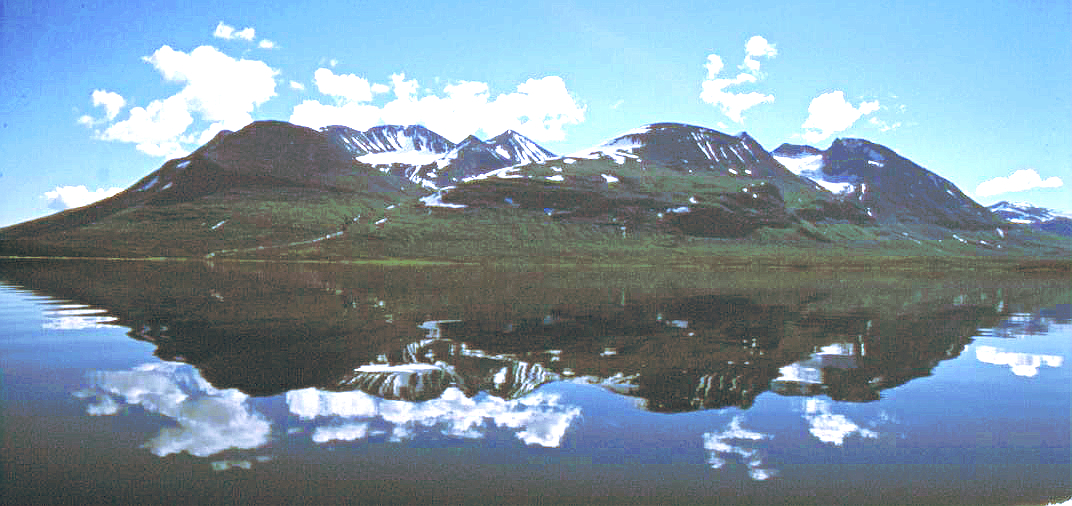 Mountain Akka from Akkajaure